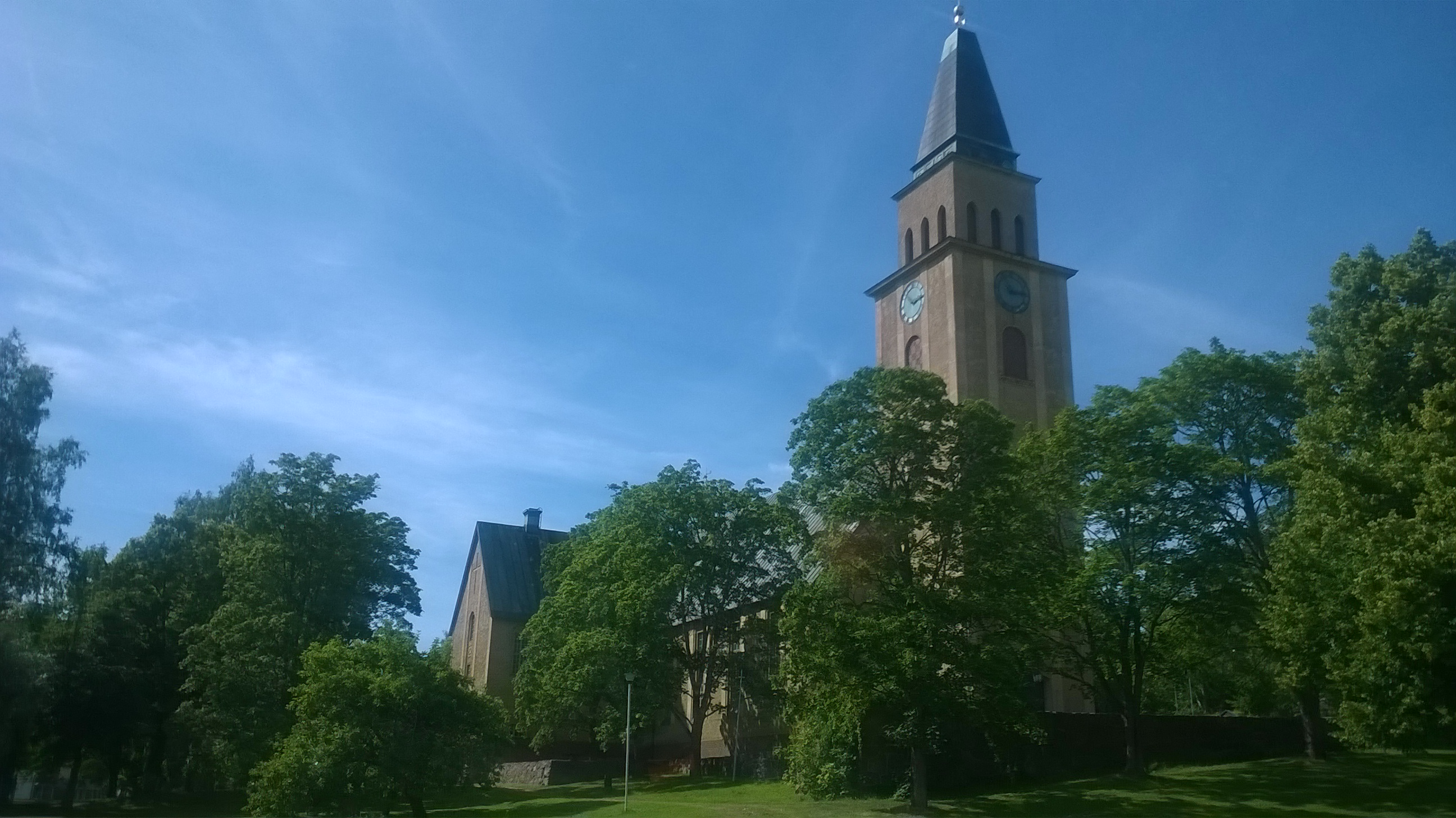 Kuusankosken kirkko